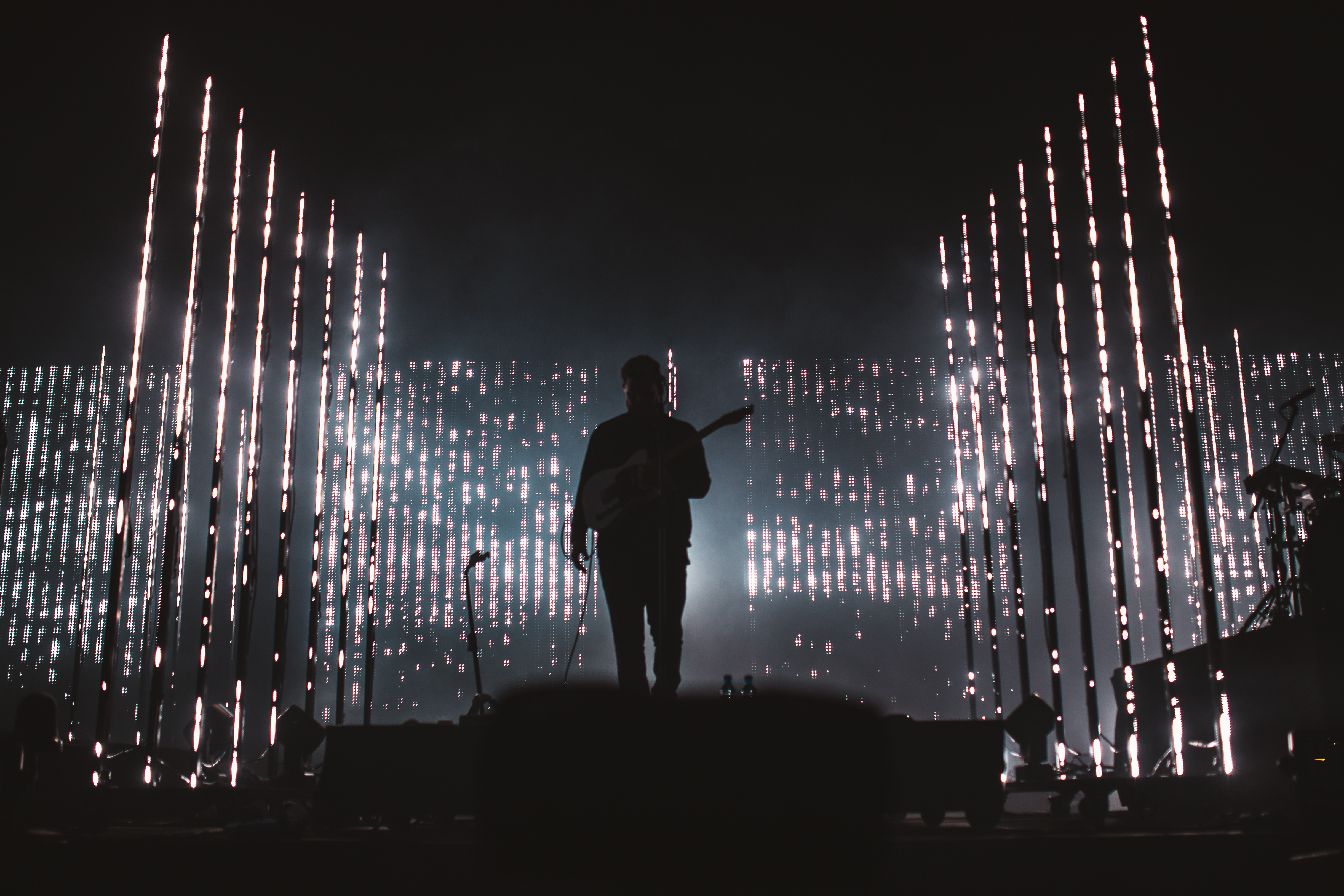 Photo: Krists Luhaers // @Kristsll